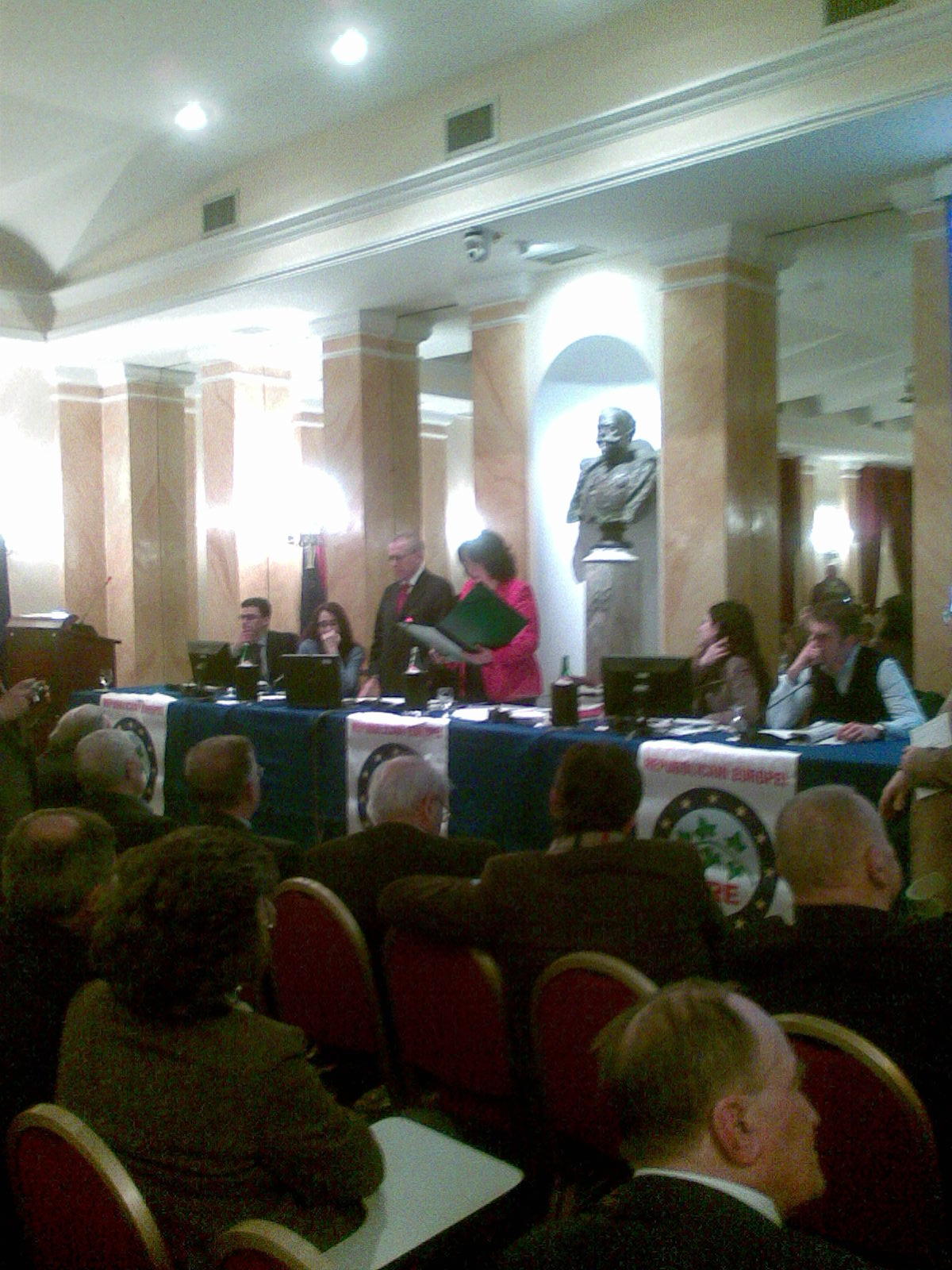 Questa è una foto che ho scattato ieri al III congresso del Movimento dei Repubblicani europei mentre la senatrice Luciana Sbarbati legge il documento comune Pri-Mre sull'impegno comune delle due forze politiche in Parlamento.